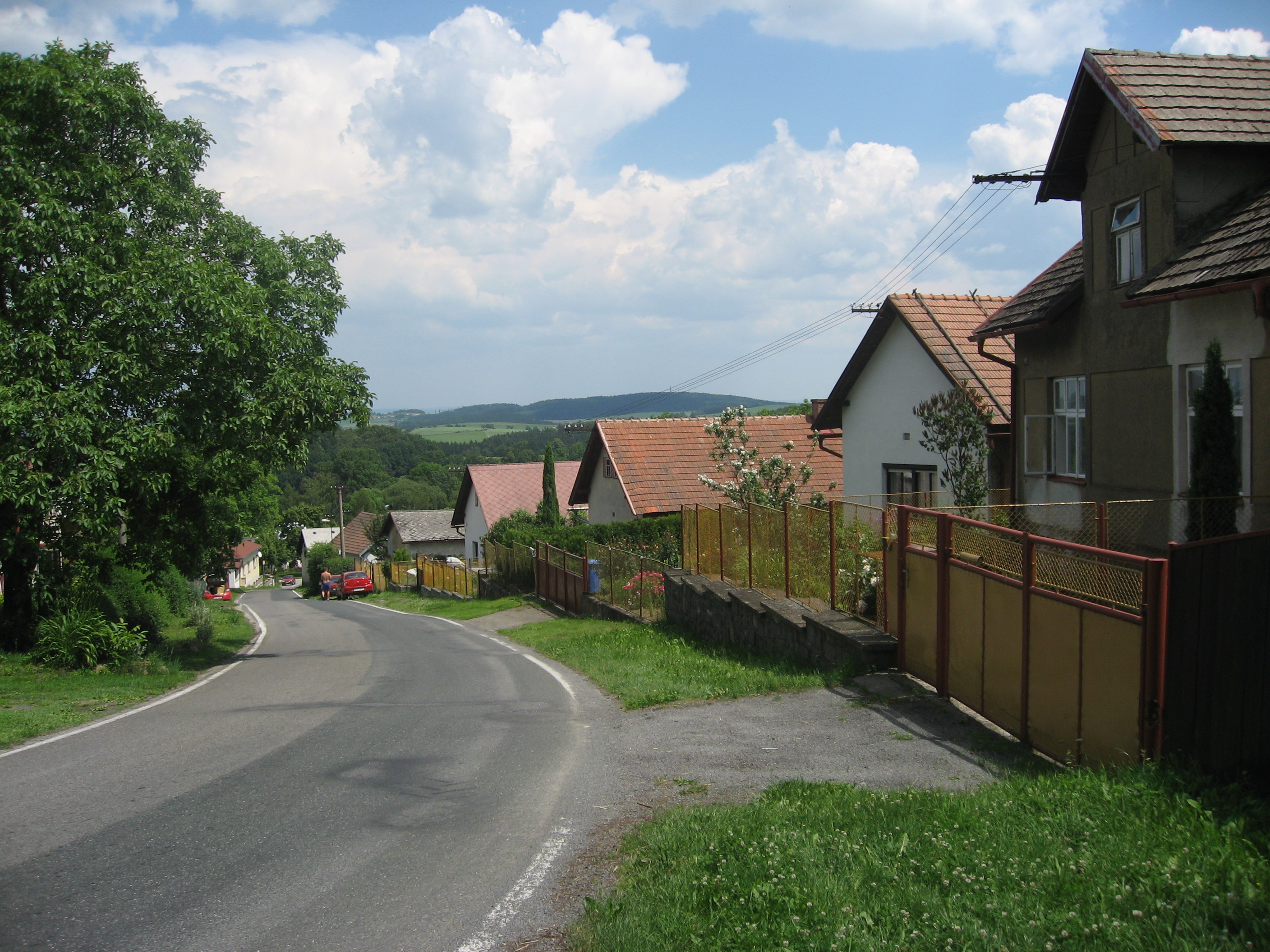 Chyška